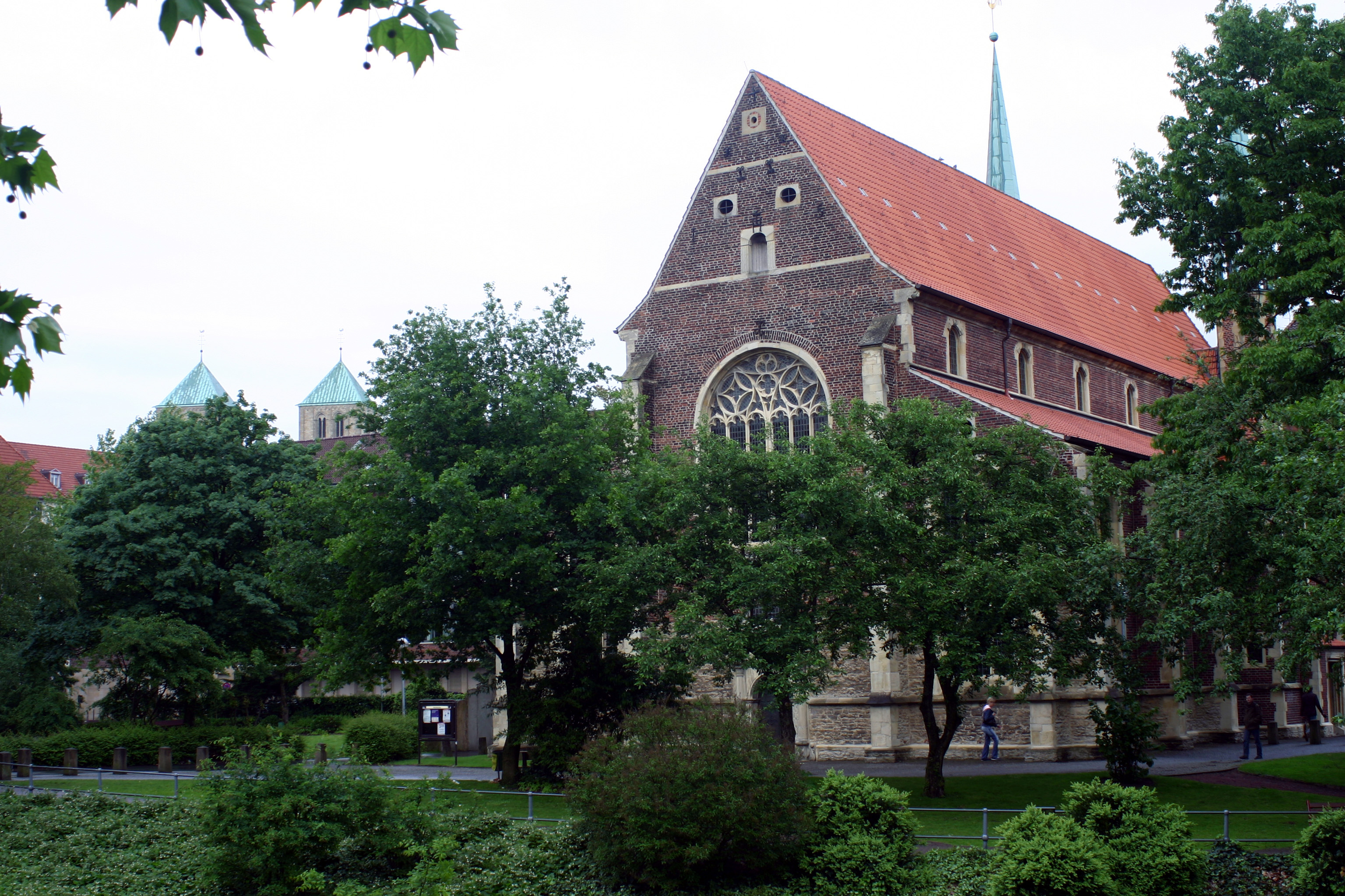 St. Peter (Petrikirche) in Münster - im Hintergrund die Türme des St. Paulus Dom